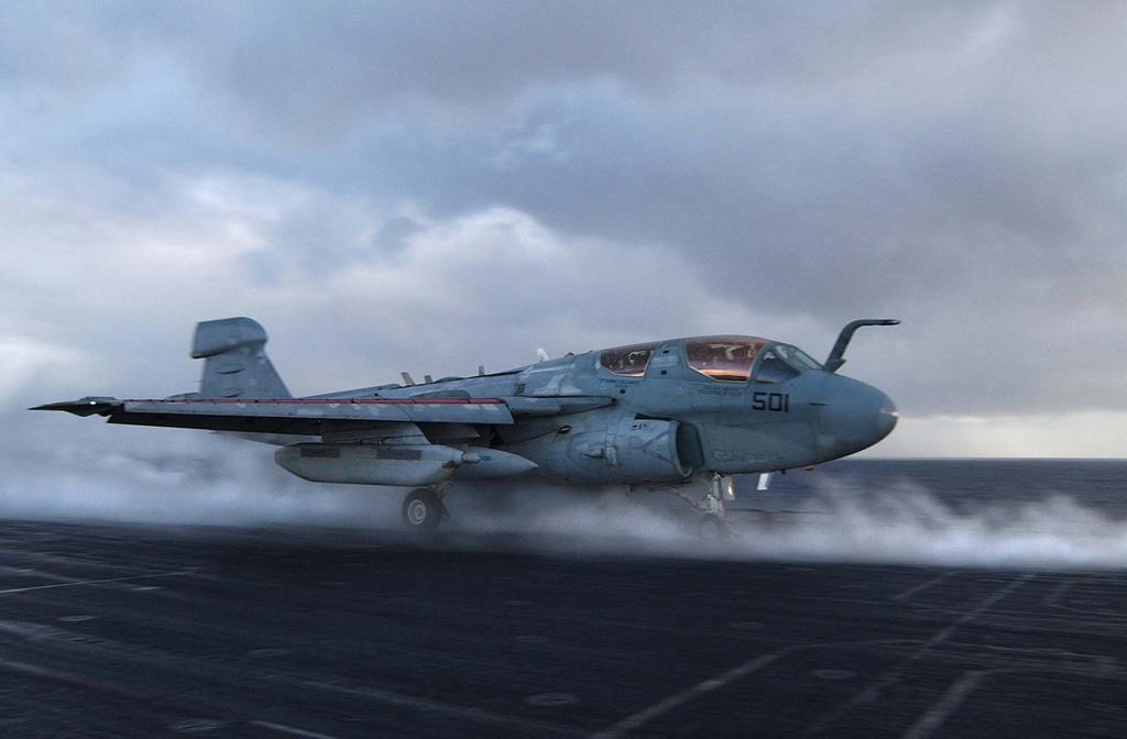 EA-6B- Prowler Public Domain Bild von af.mil [1]